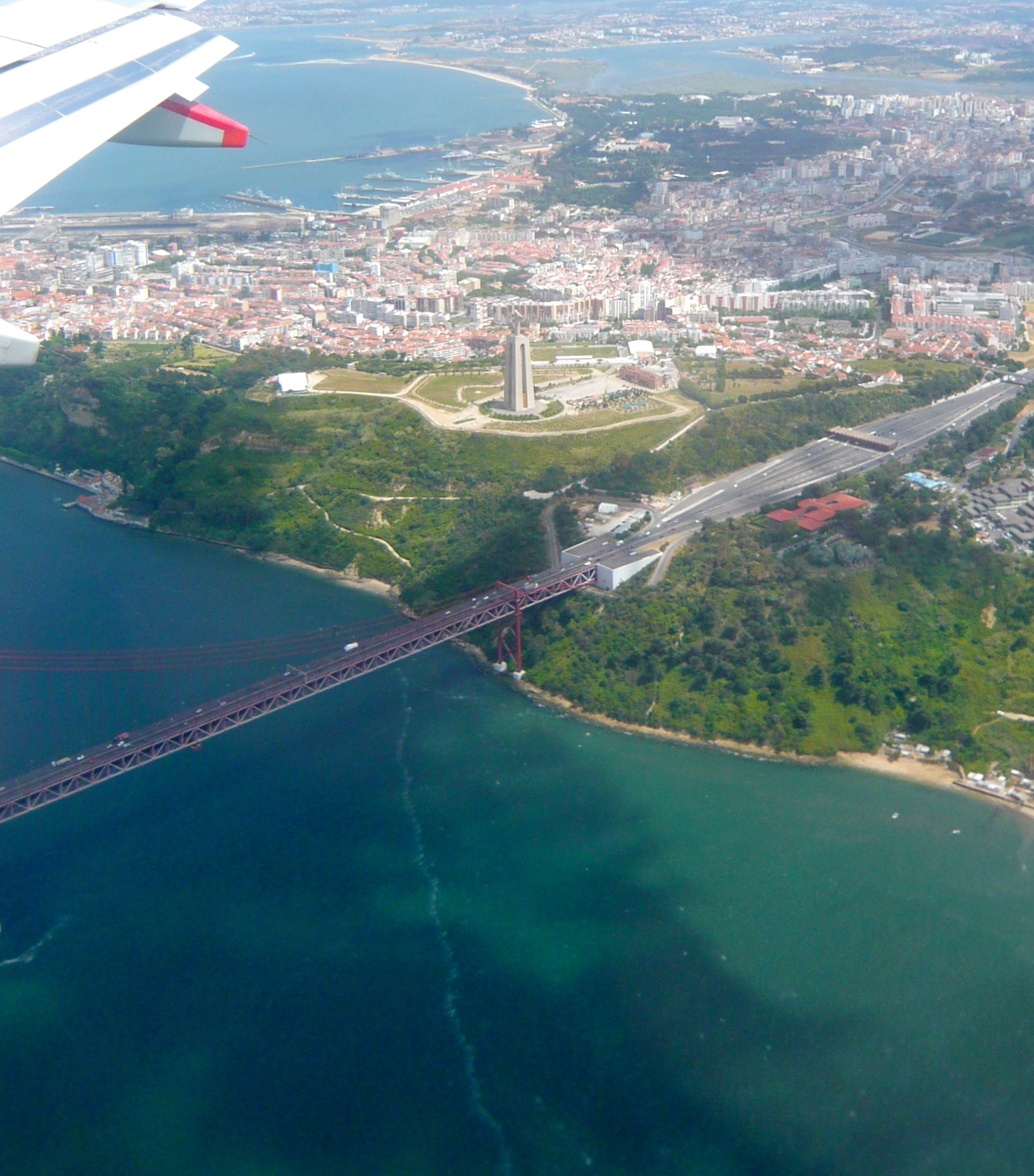 Cristo Rei; Ponte 25 de Abril